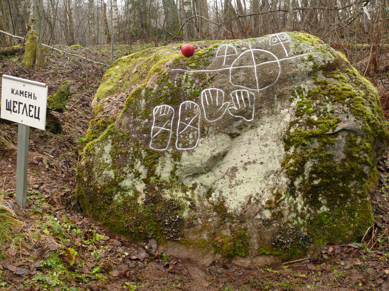 Камень Щеглец. Новгородский район Новгородской области. Наиболее заметные знаки прорисованы гуашью